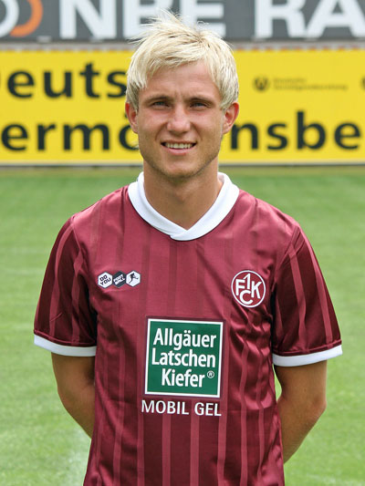 Alan Stulin, Fußballspieler